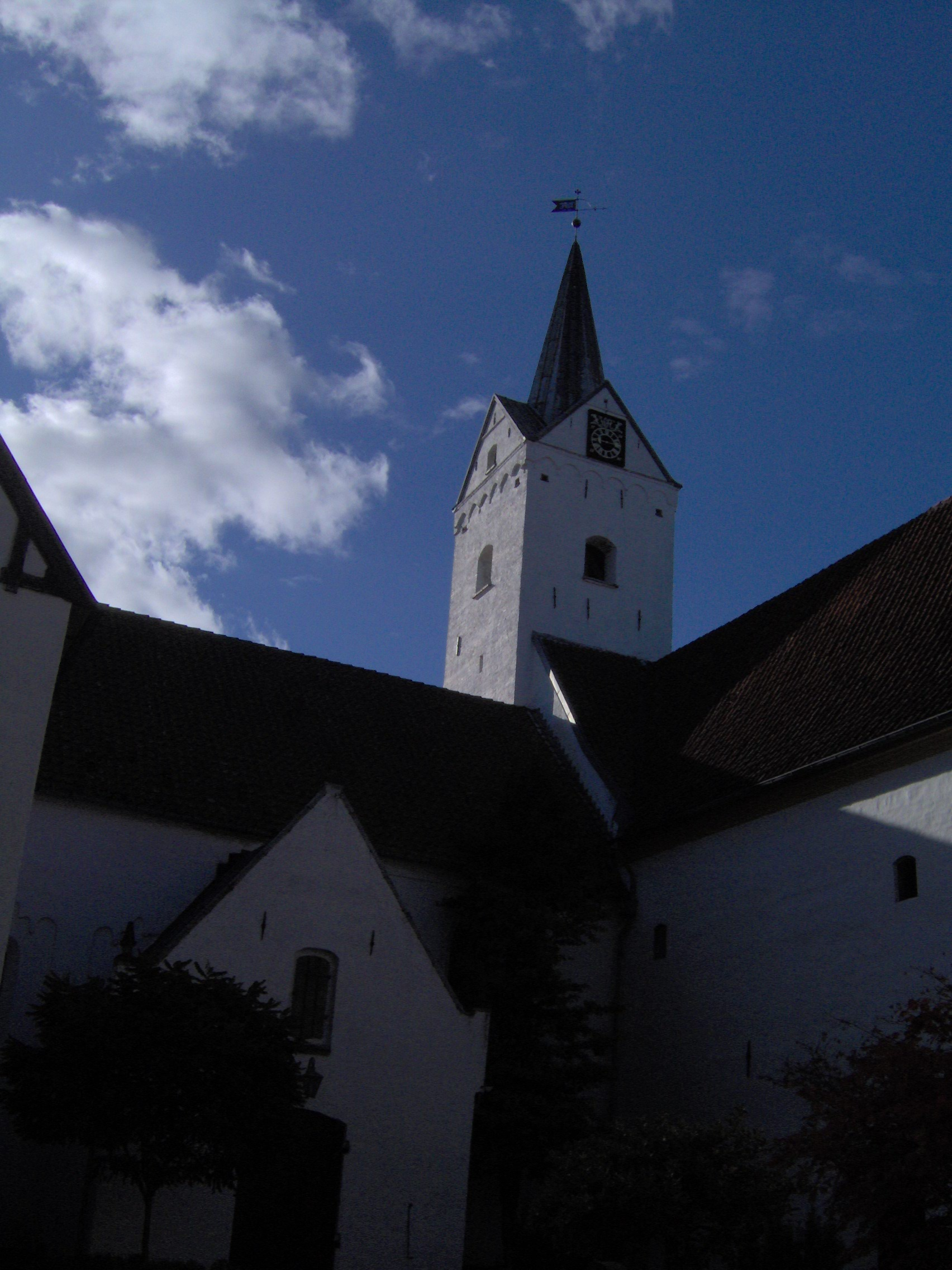 Dronninglund kirke